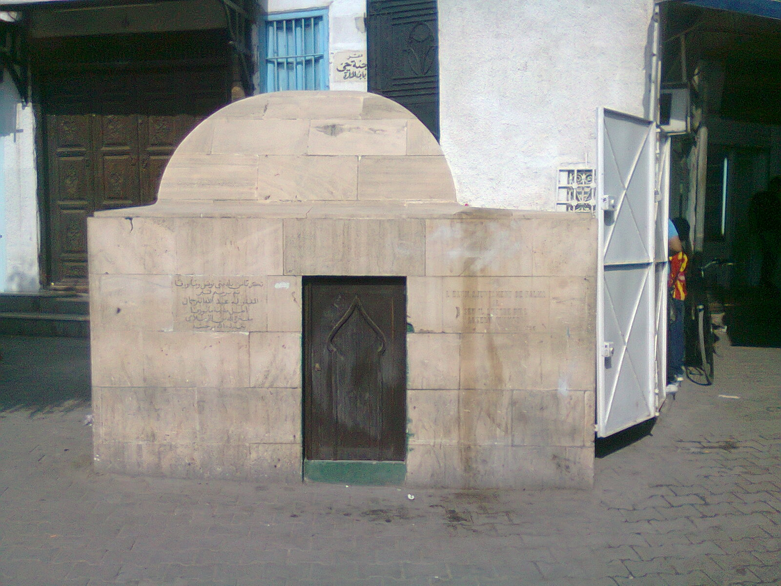 Aquesta és la tomba del mallorqui Anselm Turmeda a la ciutat de Tunis